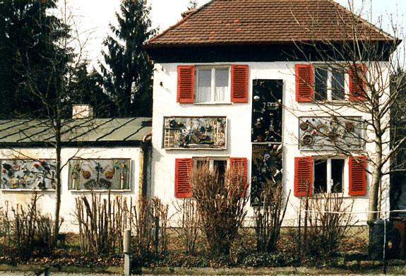 Außenfassade des Wohnhauses von I. Hünerfauth in Großhessenlohe bei München mit Tafel-Bildern